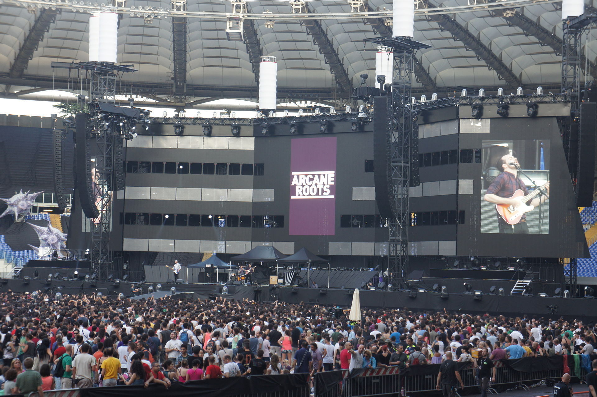 Gli Arcane Roots in concerto allo Stadio Olimpico di Roma come gruppo di supporto ai Muse